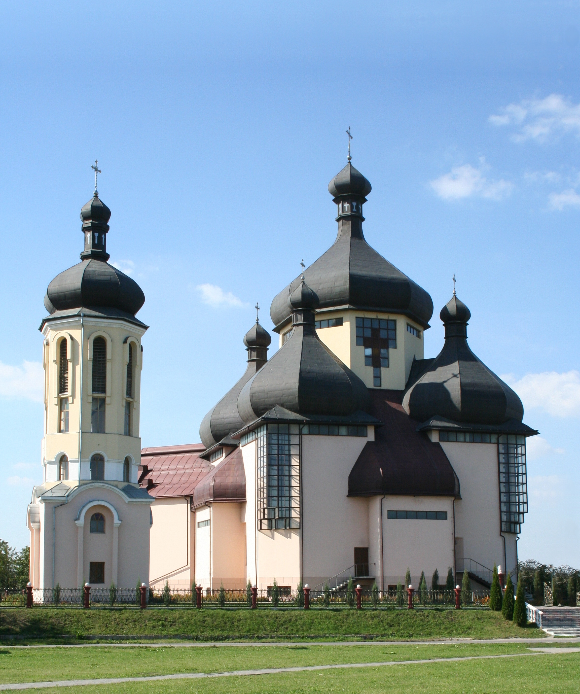 Україна Iвано-Франкiвська обл. мiсто Бурштин